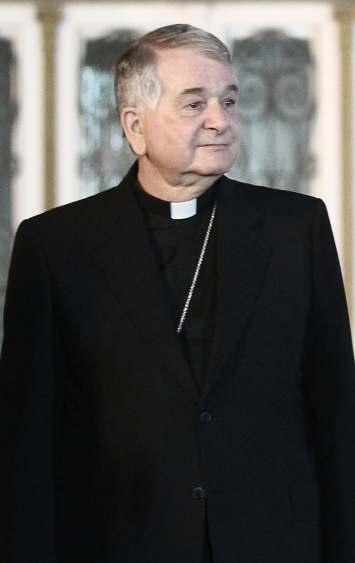 Nuncio apostólico en Argentina, monseñor Emil Paul Tscherrig